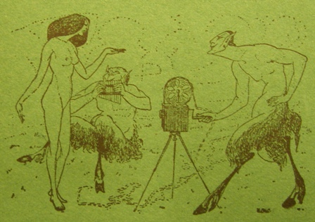 Художник Челли (В.К.Васильев). Карикатура. "Огонек" № 37 за сентябрь 1914 года